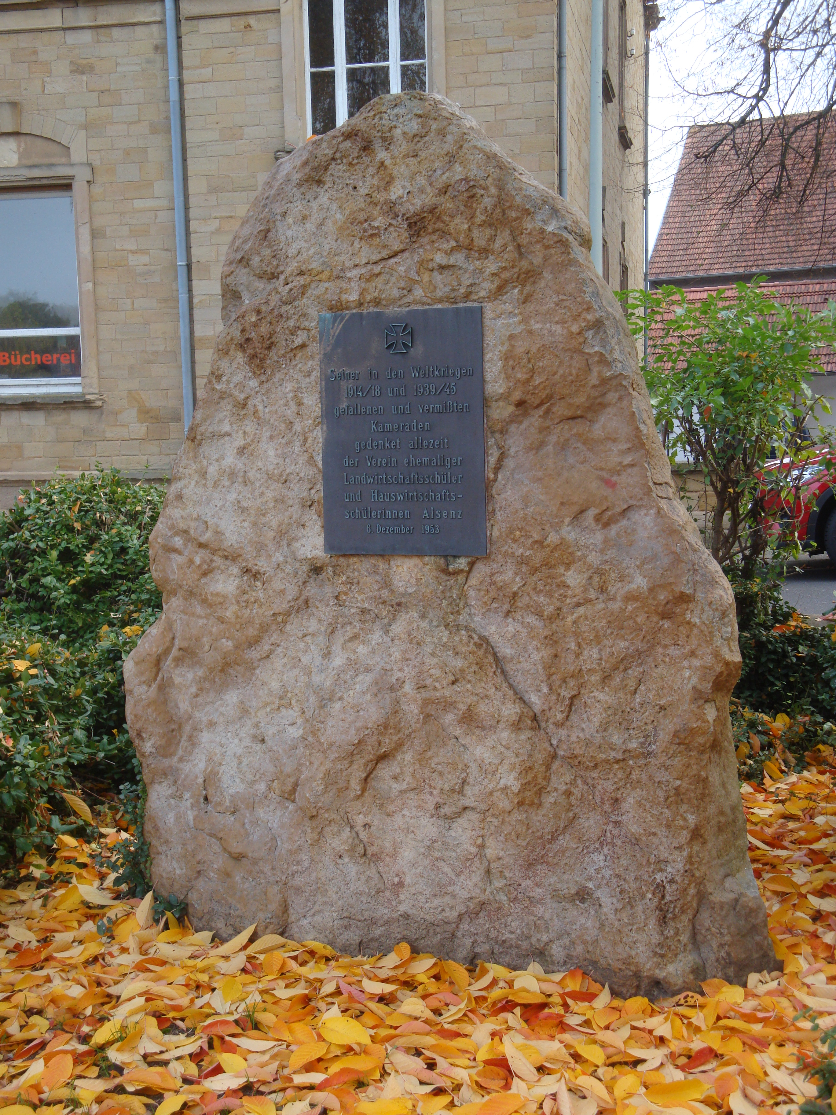 Menhir mit einer Gedenktafel für vermisste und gefallene Soldaten der beiden Weltkriege.